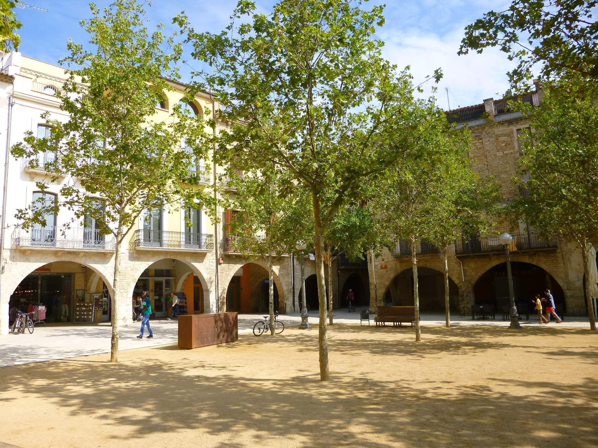 Plaza Mayor de Banyoles (Girona)